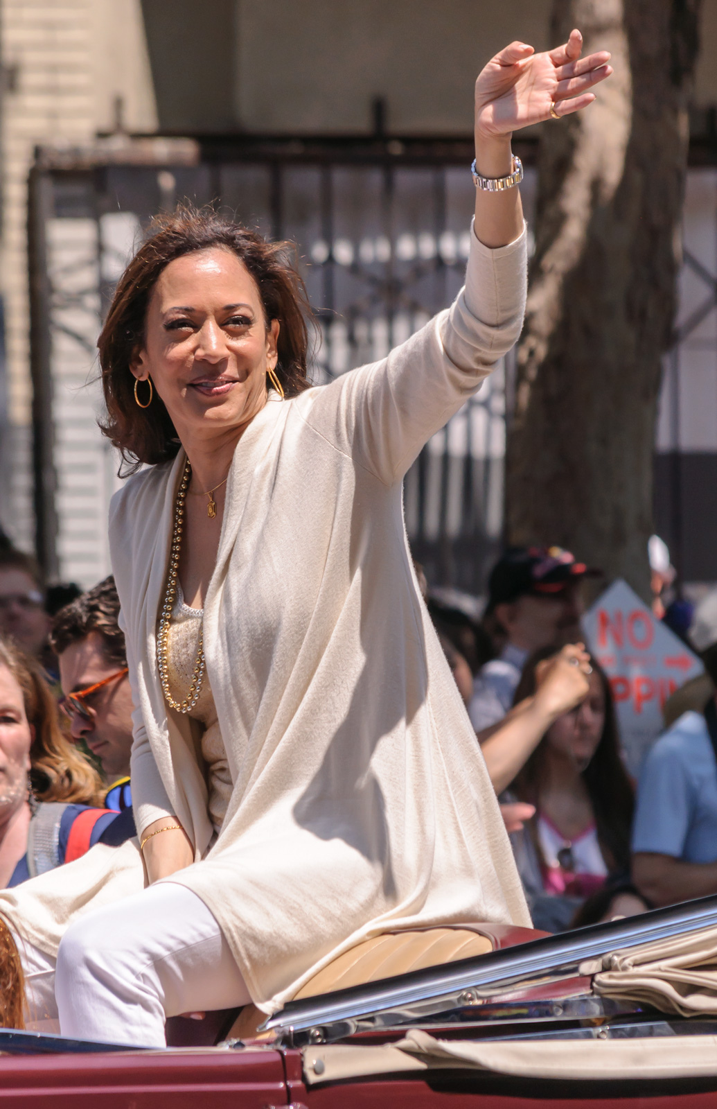 Attorney General Kamala Harris, San Francisco Pride 2013